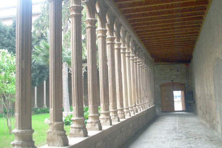 claustro del Convento de Sant Domènec, en Balaguer (Lleida, Cataluña, España)